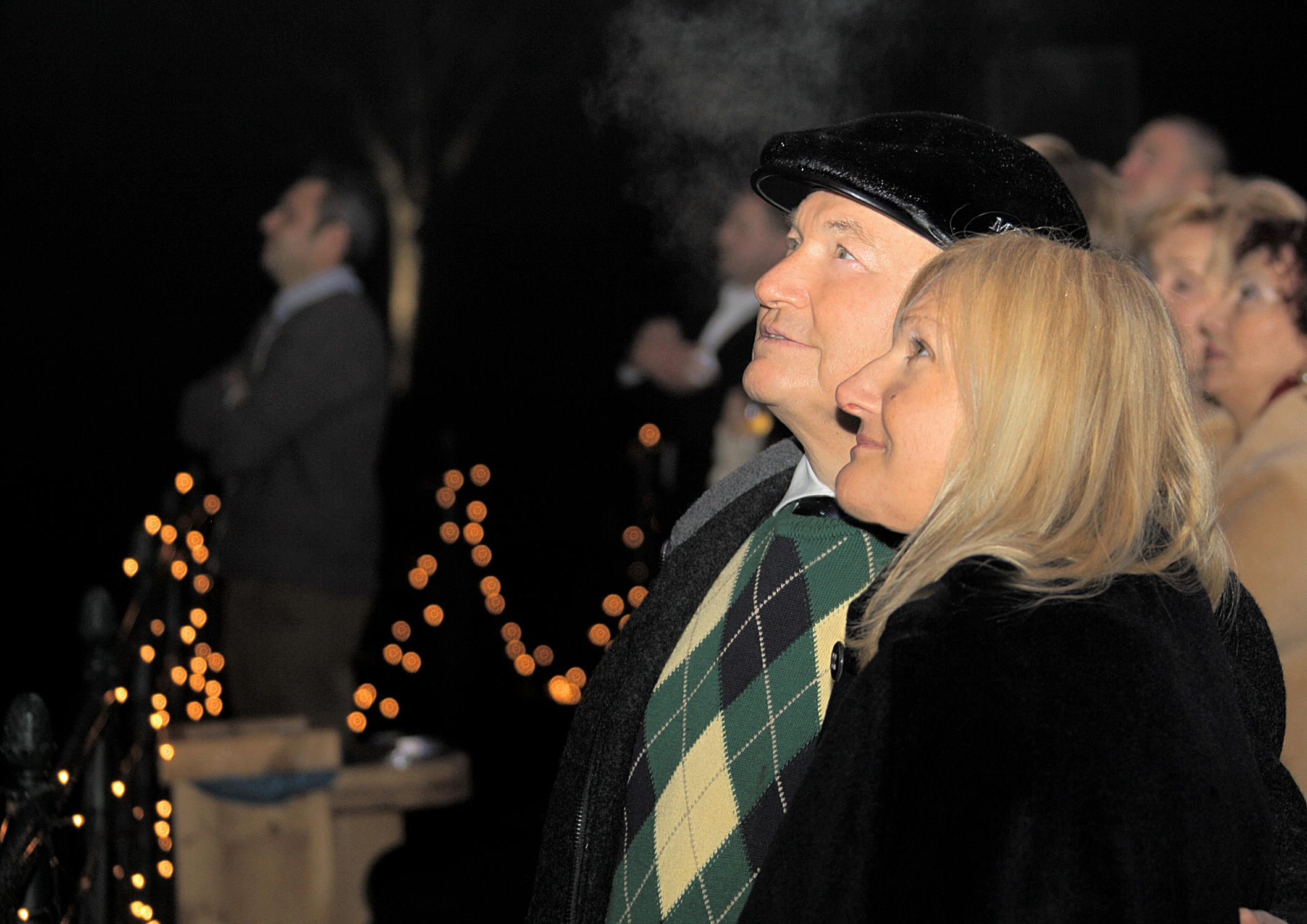 Yelena-Baturina-and-Yury Luzhkov